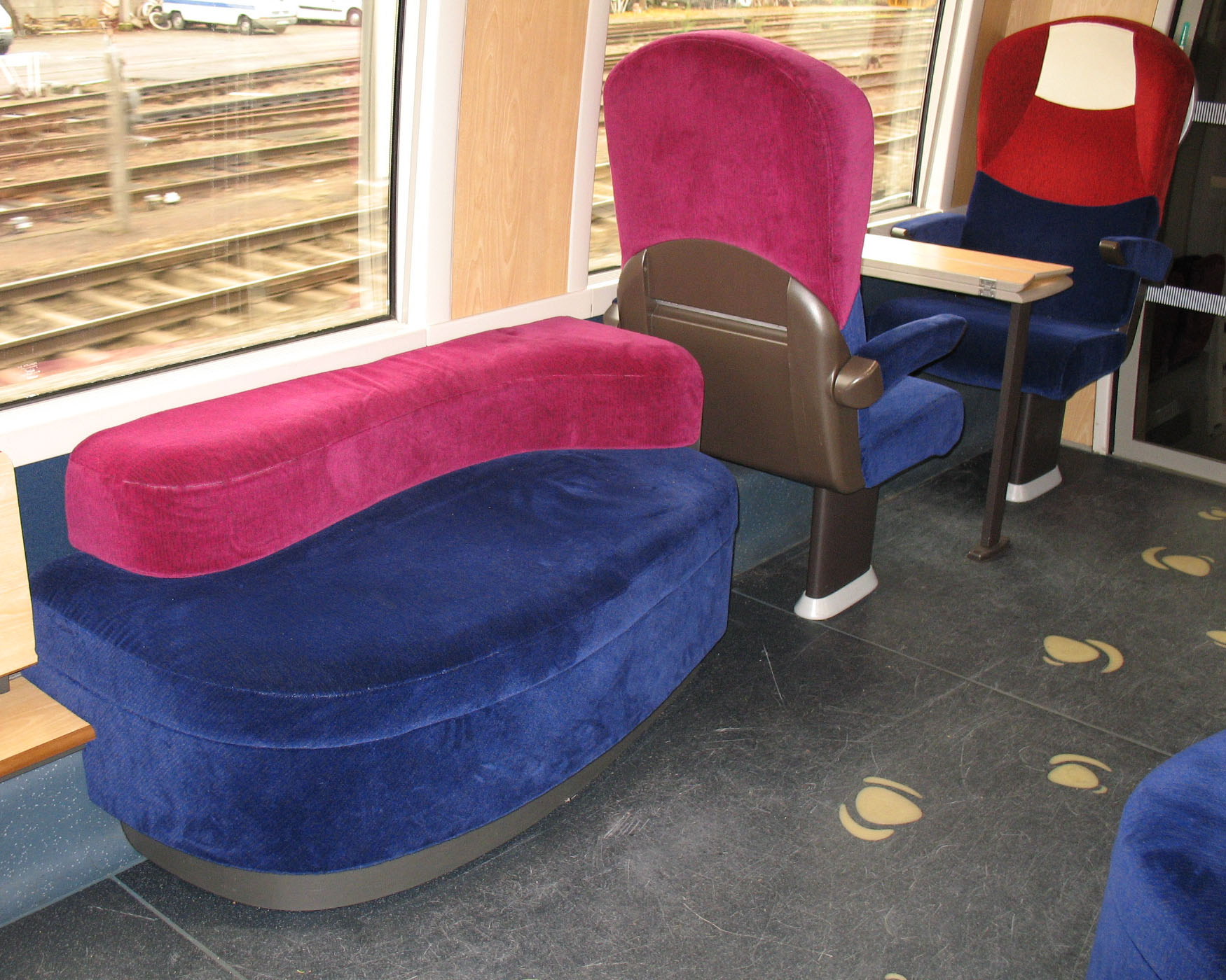 Le mooviTER, nouvelle rame de Transport express régional (TER) inaugurée le 10 octobre 2008 et circulant dans la région Bretagne sur la ligne Brest-Rennes. Photo prise en deuxième classe.